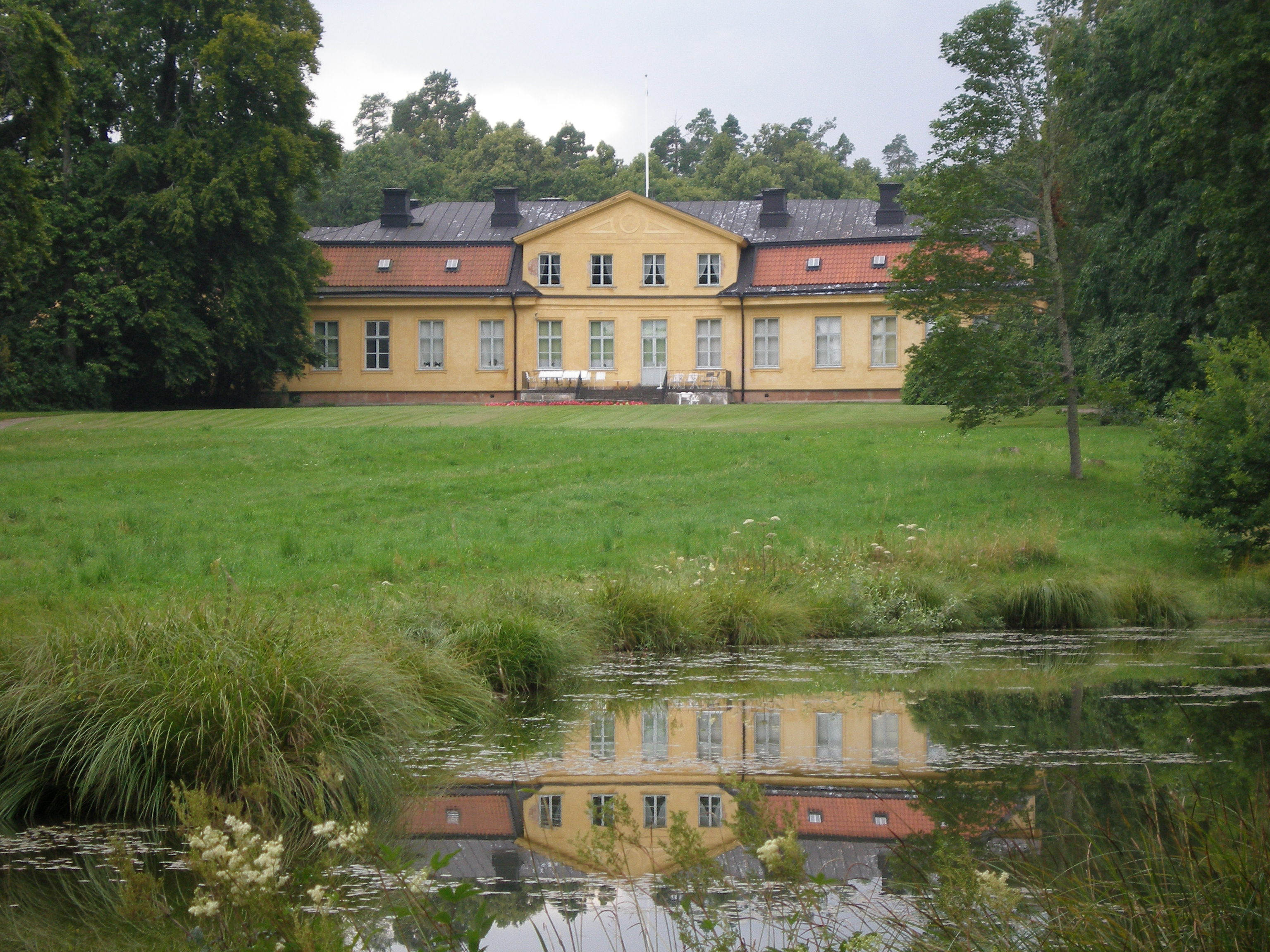 Lambohov säteri från bakgården